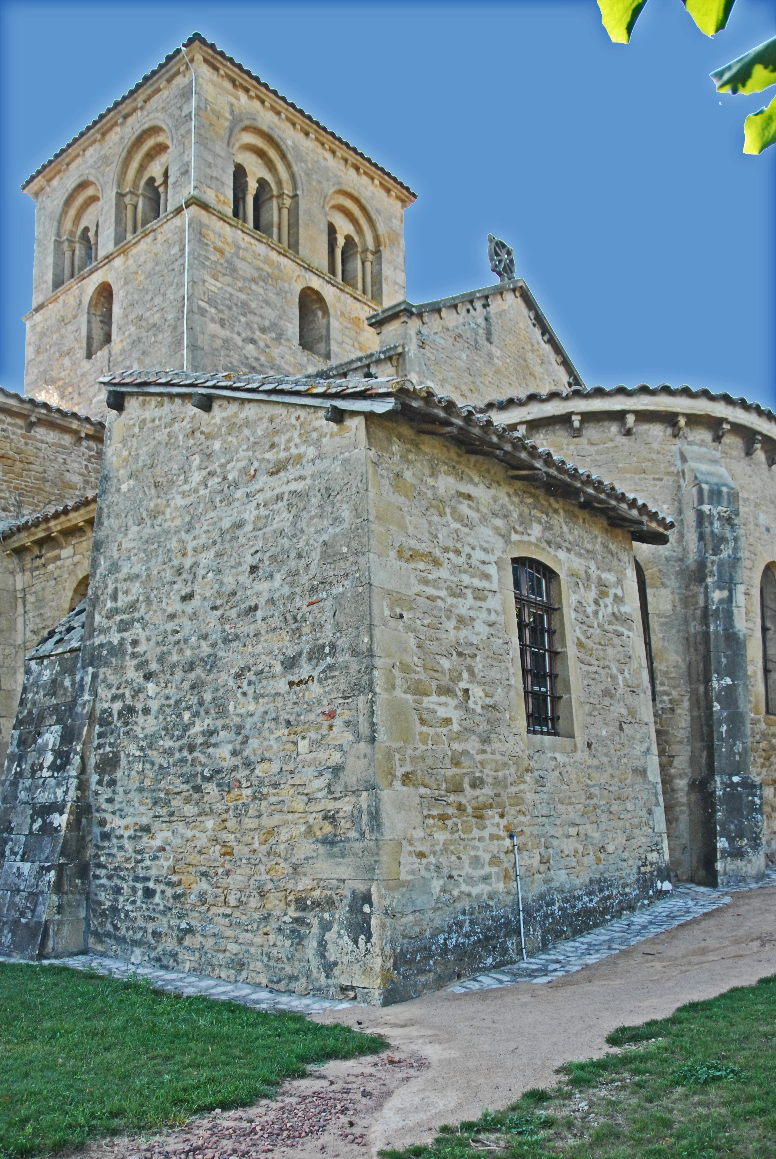 St-André d'Iguerande, Chorhaupt von Osten